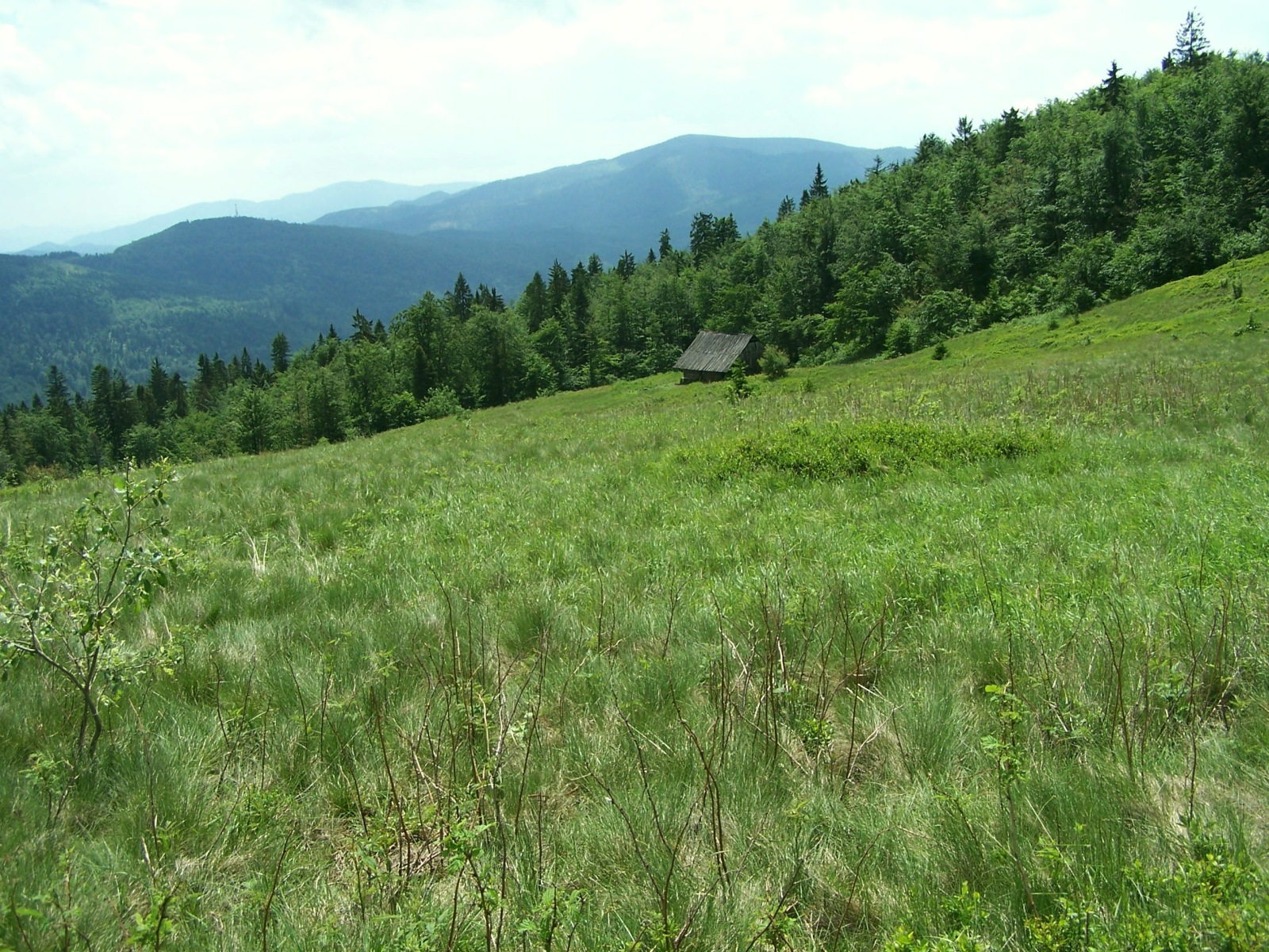 Jasień (Beskid Wyspowy). Polana Skalne